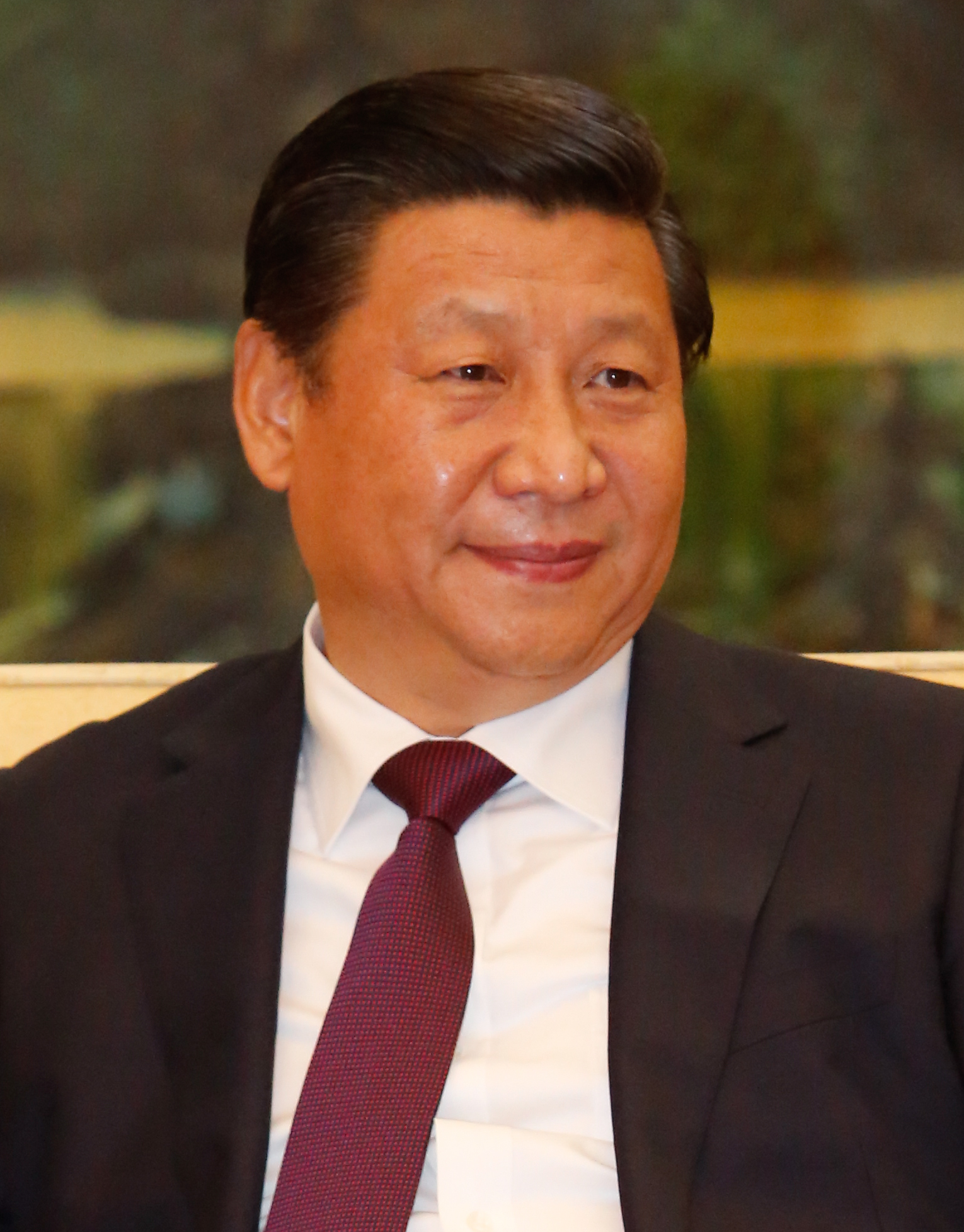 Em Pequim, o vice-presidente Michel Temer se encontra com o presidente da República Popular da China, no Palácio do Povo